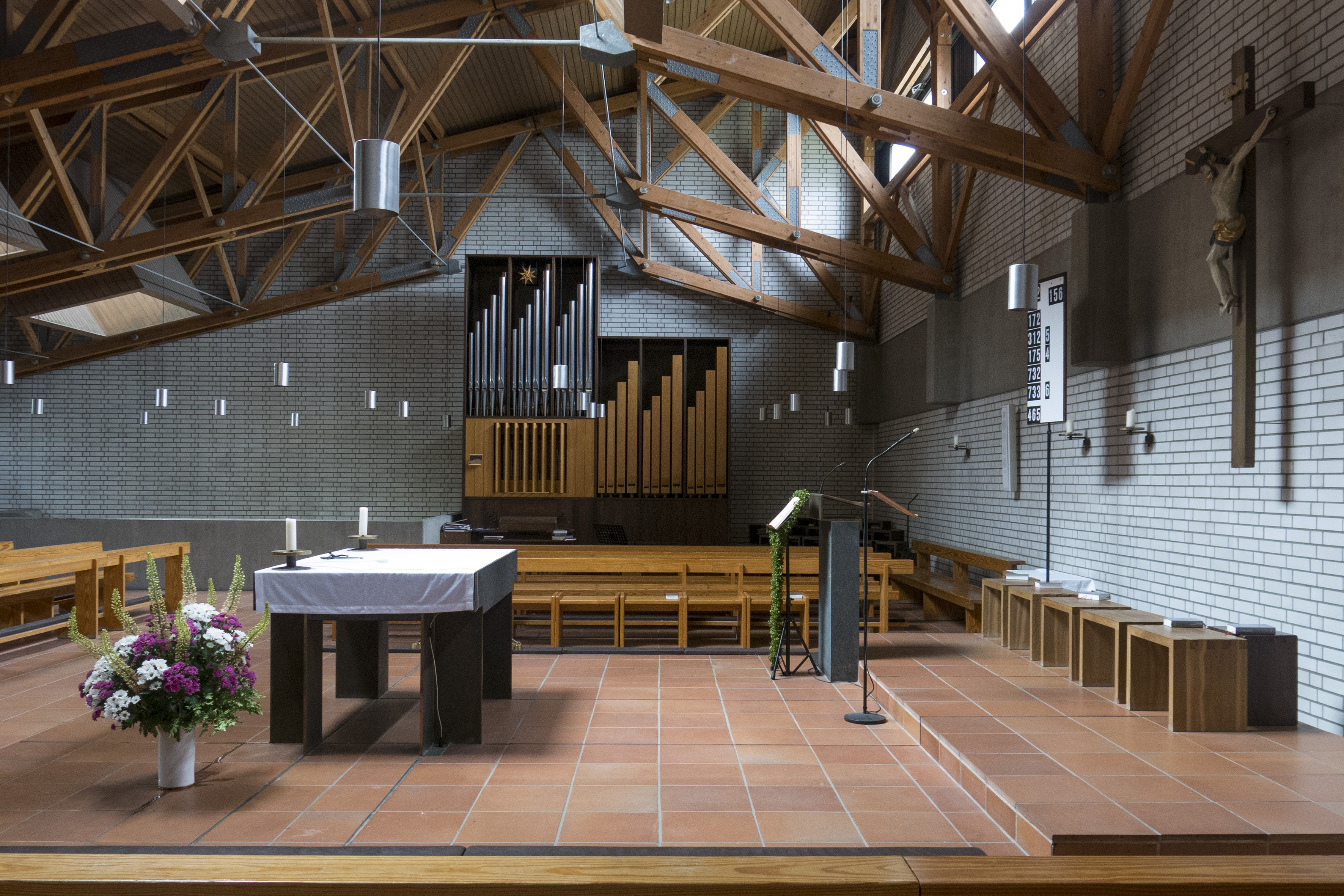 Ökumenisches Kirchenzentrum Parkstadt Solln (München) Kirchenraum St. Ansgar